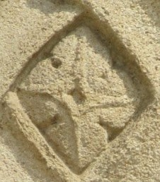 Blüte des Gemeinen Flieders am alten Rathaus in Luxemburg Stadt am Krautmarkt (Palais Grand-ducal)